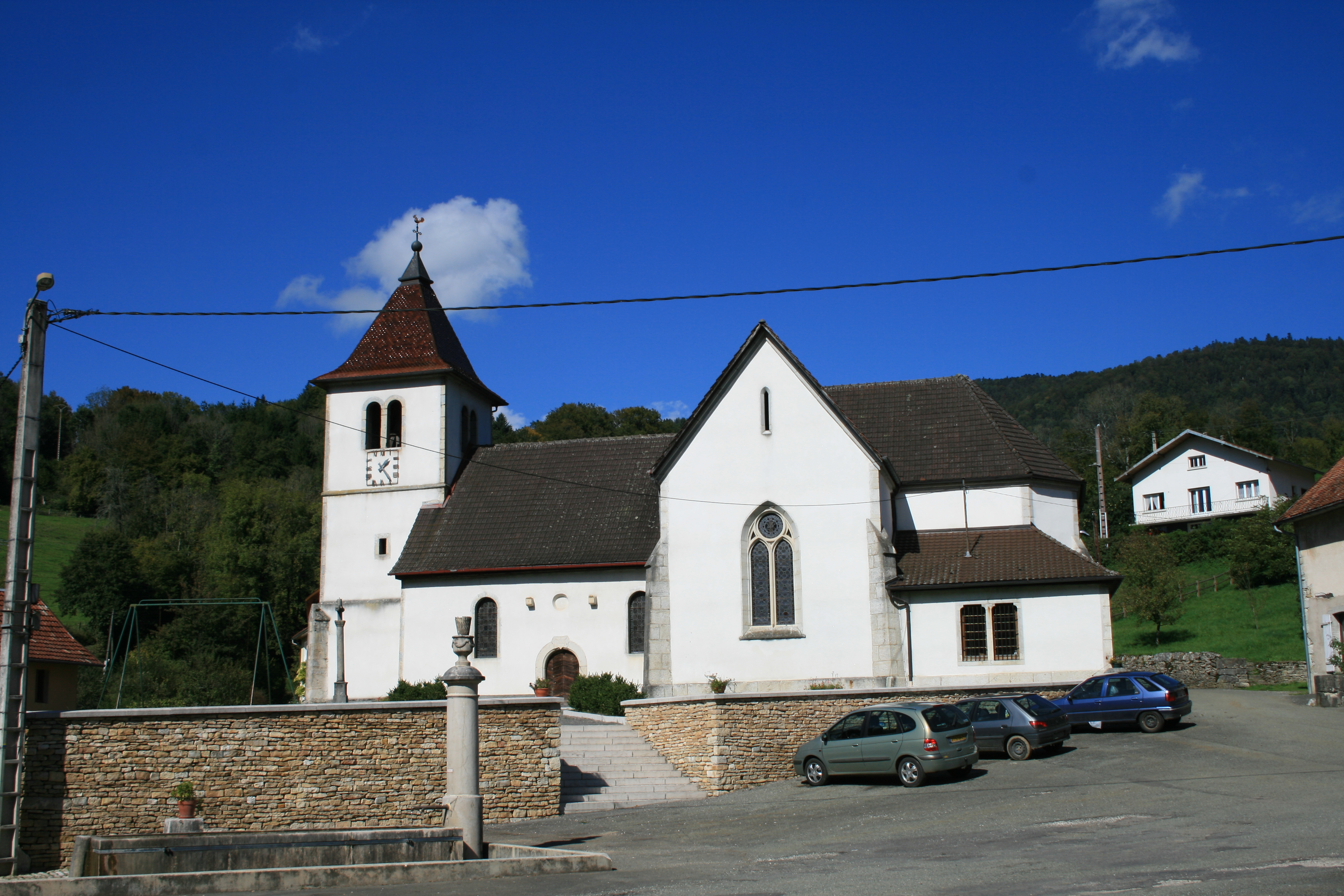 Kirche von Glère